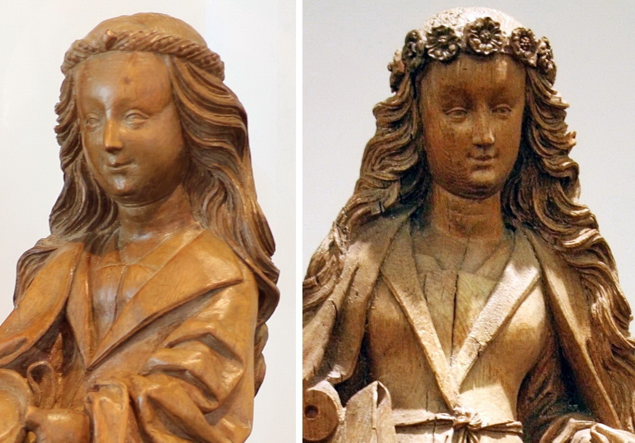 Collage van twee fotodetails van houten beelden in het Bonnefantenmuseum in Maastricht. Beide sculpturen zijn van Jan van Steffeswert. Links: detail van Anna te Drieën; rechts: detail van een vrouwelijke heilige. Het linkerbeeld is gedateerd (1500), maar niet gesigneerd. Het rechter is gedateerd(1501) en gesigneerd. De collage maakt gebruikt van afbeeldingen die met een vrije licentie op Wikimedia Commons staan (oorspronkelijke uploaders: Sailko en Ophelia2): Jan_van_steffeswert,_sant'anna_metterza,_1500_(maastricht).jpg Jan_van_Steffenswert_-_Vrouwelijke_heilige.JPG